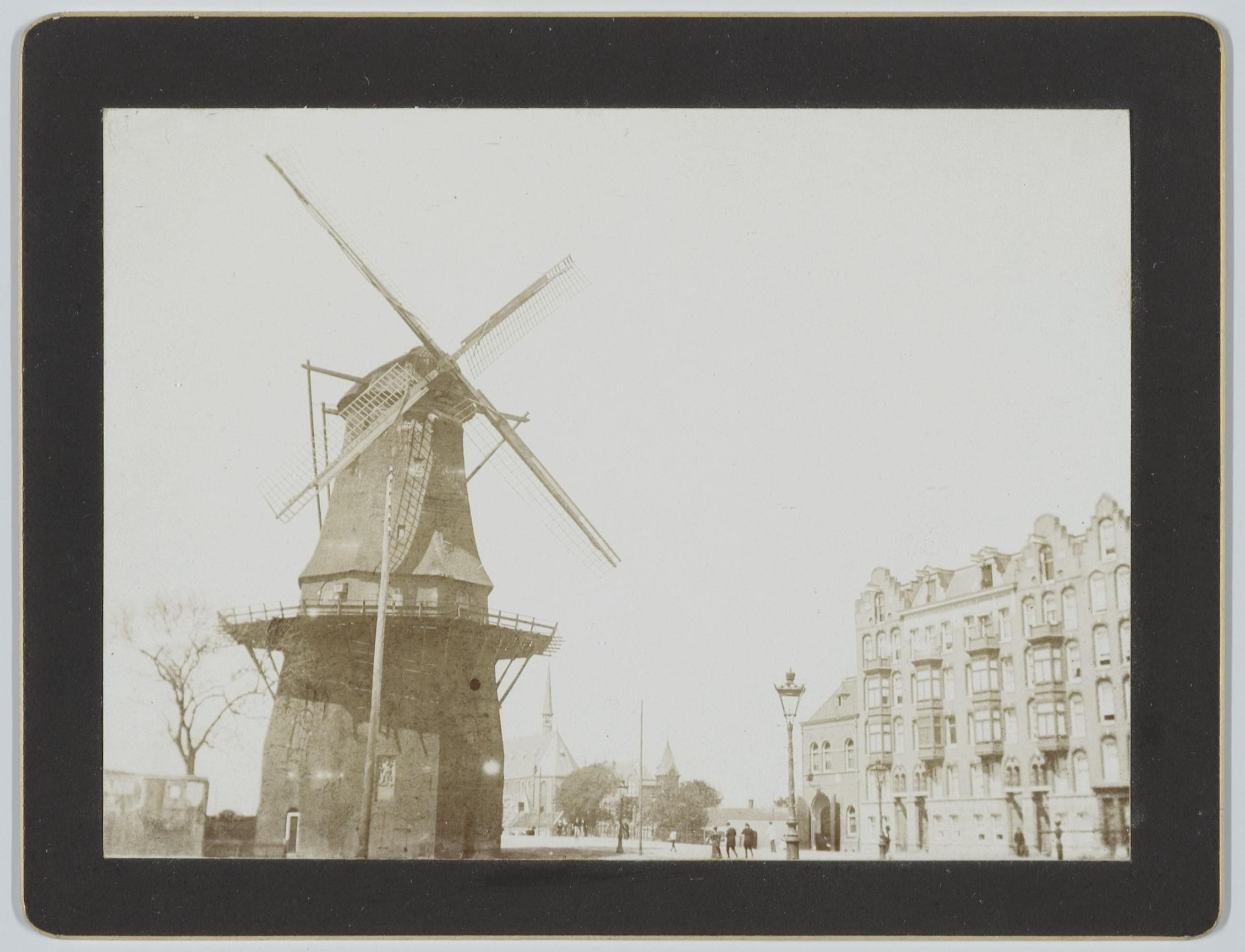 Beschrijving Molen 'De Victor' bij de kruising van Marnixstraat en Rozengracht, afgebroken in 1898 Rechts Rozengracht 228-238 en in het verschiet de achterzijde van de rooms-katholieke kerk De Liefde aan de Da Costakade. Documenttype foto Vervaardiger Onbekend Anoniem Collectie Collectie Stadsarchief Amsterdam: foto-afdrukken Datering 1896 ca. Geografische naam Marnixstraat Rozengracht Inventarissen Afbeeldingsbestand ANWE00226000001